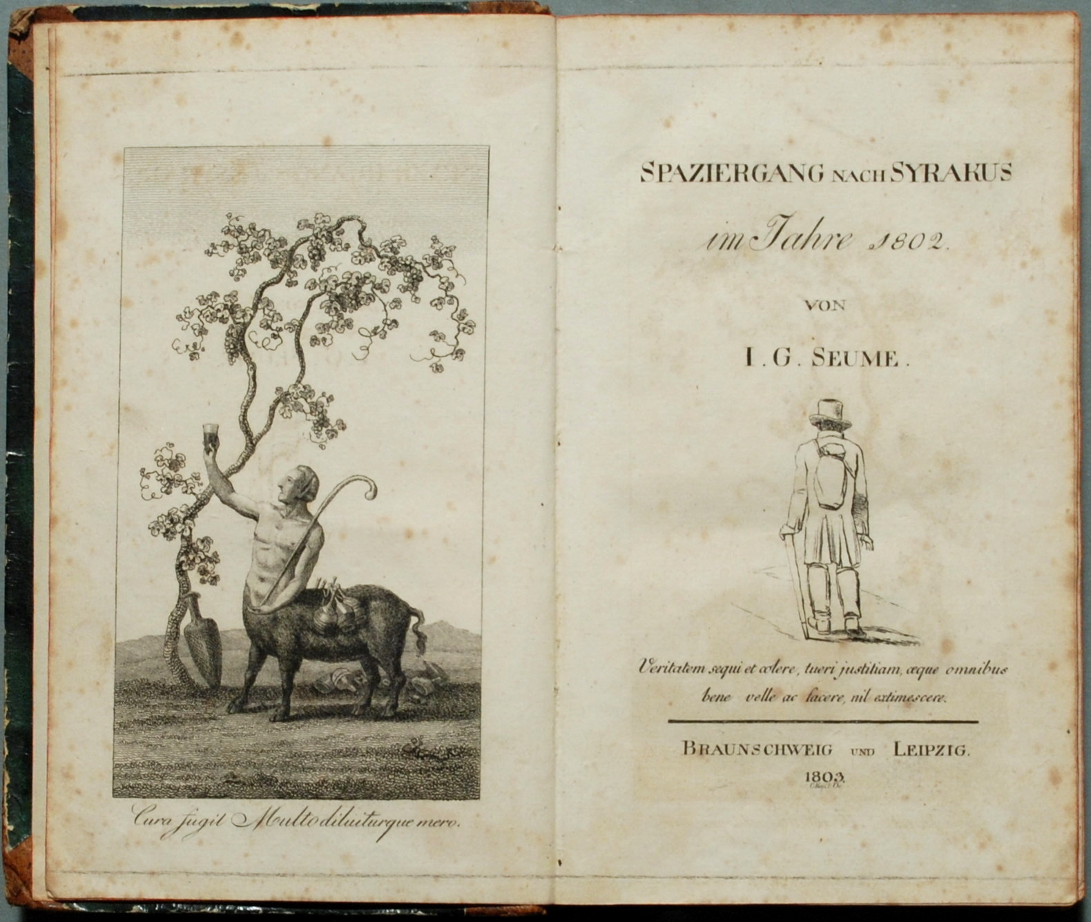 Seume, Johann Gottfried: Spaziergang nach Syrakus im Jahre 1802. Braunschweig und Leipzig 1803 [ohne Verlagsangabe]. Gestochenes Frontispiz + gestochener Titel, XVI Seiten + 491 Seiten + 1 Blatt Druckfehler; Wilpert/Gühring² 12. BEIGEBUNDEN: Seume, Johann Gottfried: Mein Sommer 1805 [Seumes Erlebnisse in Russland, Finnland und Schweden; ohne Ort, Verlag, Jahr]; XXVIII Seiten + 1Blatt Druckfehler + 1 leeres Blatt + 262 Seiten + 1 leeres Blatt; Wilpert/Gühring² 17 Erstdruck. Halbleder der Zeit (Buchdeckel 210 x 124 mm); ledernes Rückenschild, Rückenschmuck ehemals in Goldprägung, inzwischen abgegriffen: klassizistische Motive (mehrere Querbänder mit Akanthus - Palmetten, am Rückenfuß ein Querband mit Eichenlaubgirlande); Rotschnitt; Text von "Spaziergang nach Syrakus" auf gebläutem Papier, von "Mein Sommer 1805" auf weißem.